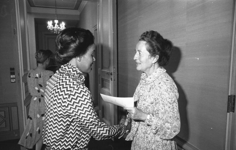 Frau Dr. Veronica Carstens empfängt ausländische Botschafter-Frauen